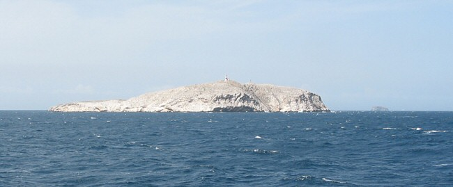 Monjes del Sur, Federal Dependencies of Venezuela